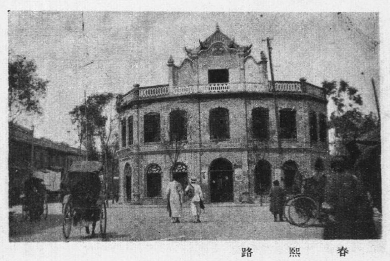 鄭璧成著四川導遊插圖